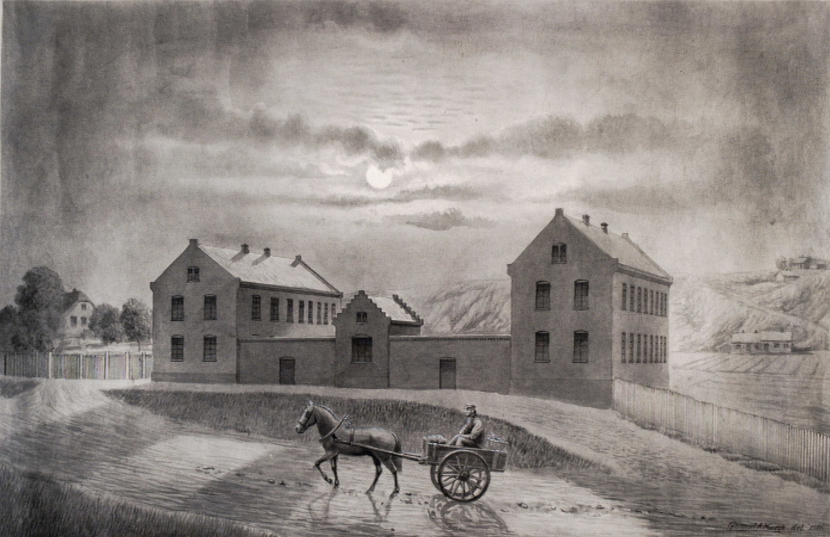 Toftes gave, Munkedamsveien 31. Revet. Lavering av Gumal Alexander Hjorth, avfotografert av Rune Aakvik. Fra Byhistorisk samling hos Oslo Museum.